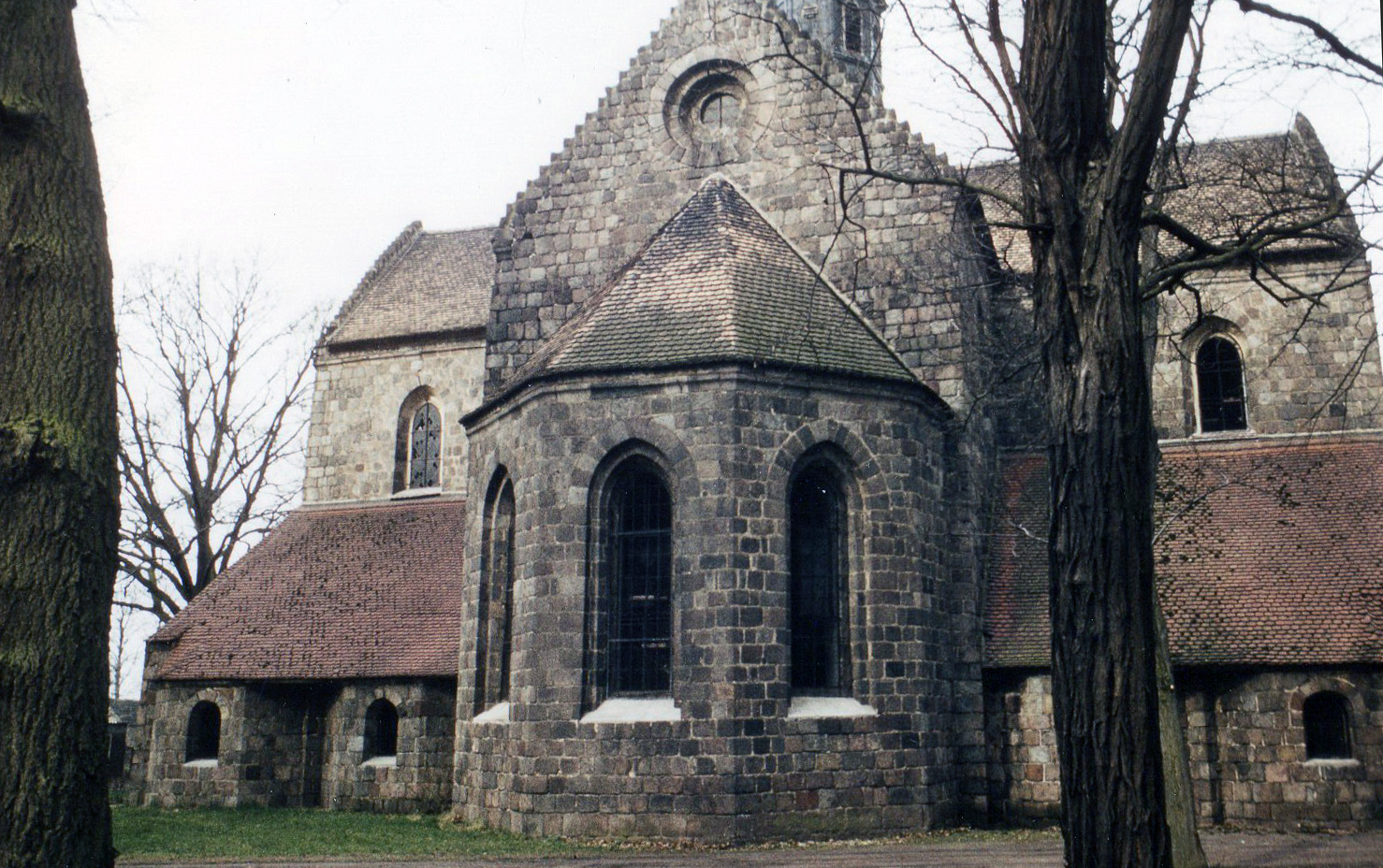 Klosterkirche Zinna, von Osten her gesehen, mit Querhaus, polygonaler Hauptapsis und vier polygonalen Nebenapsiden